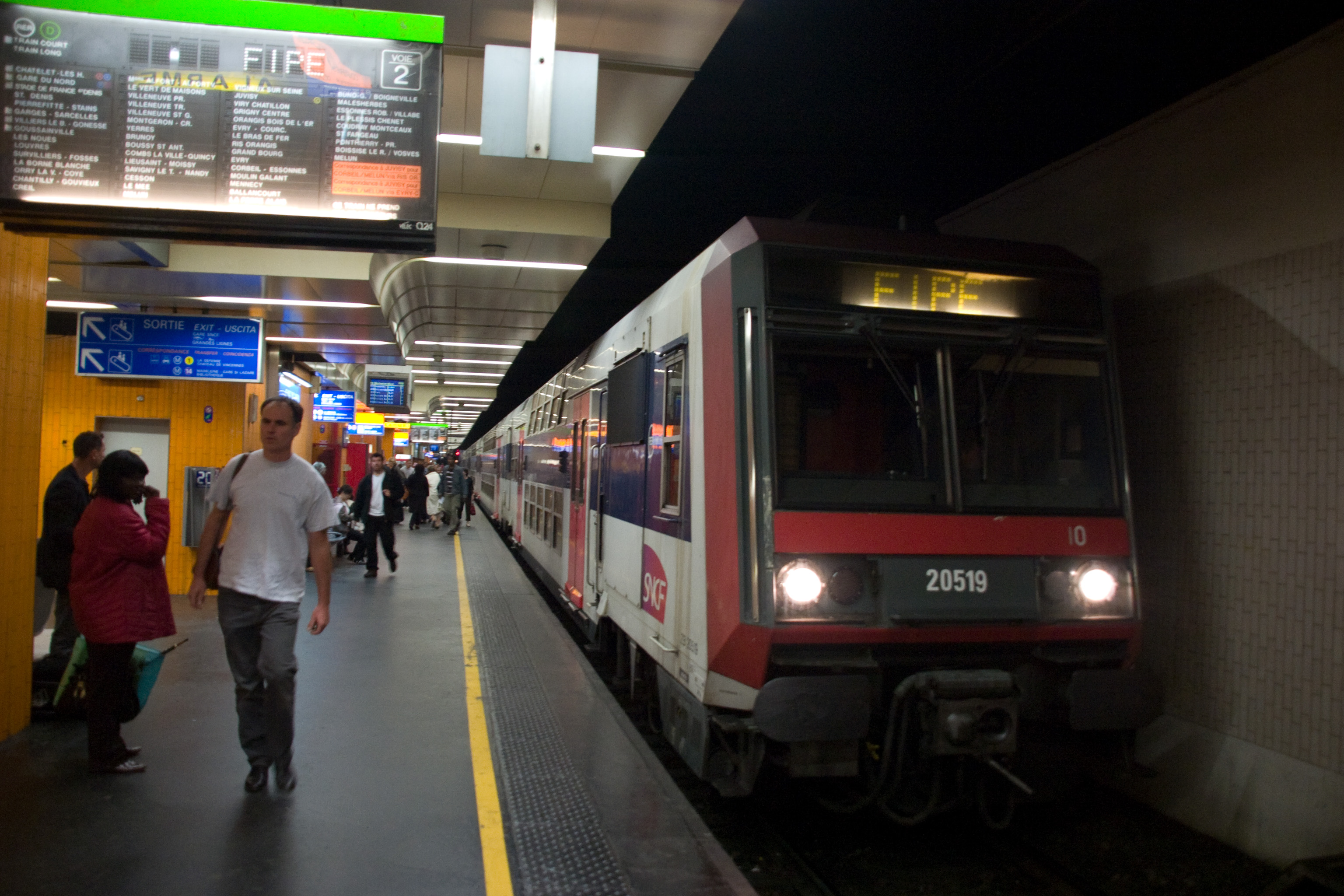 Gare de Lyon, Paris, France